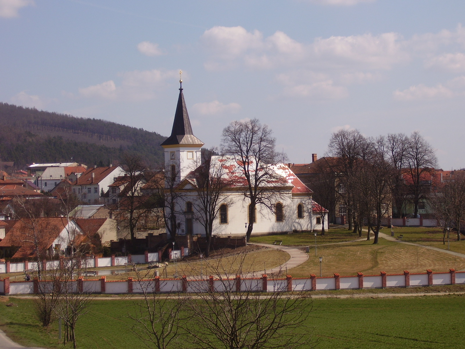 Kostel sv. Cecilie (Lipůvka), Lipůvka